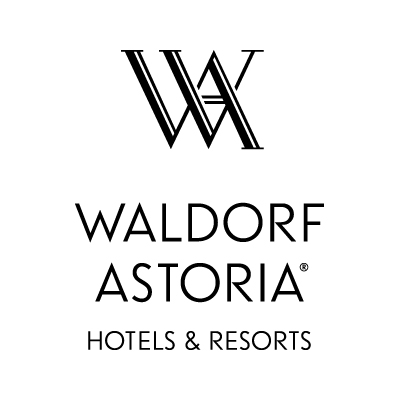 Waldorf Astoria logo